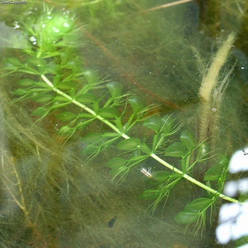 ムジナモ Waterwheel plant (Aldrovanda vesiculosa)